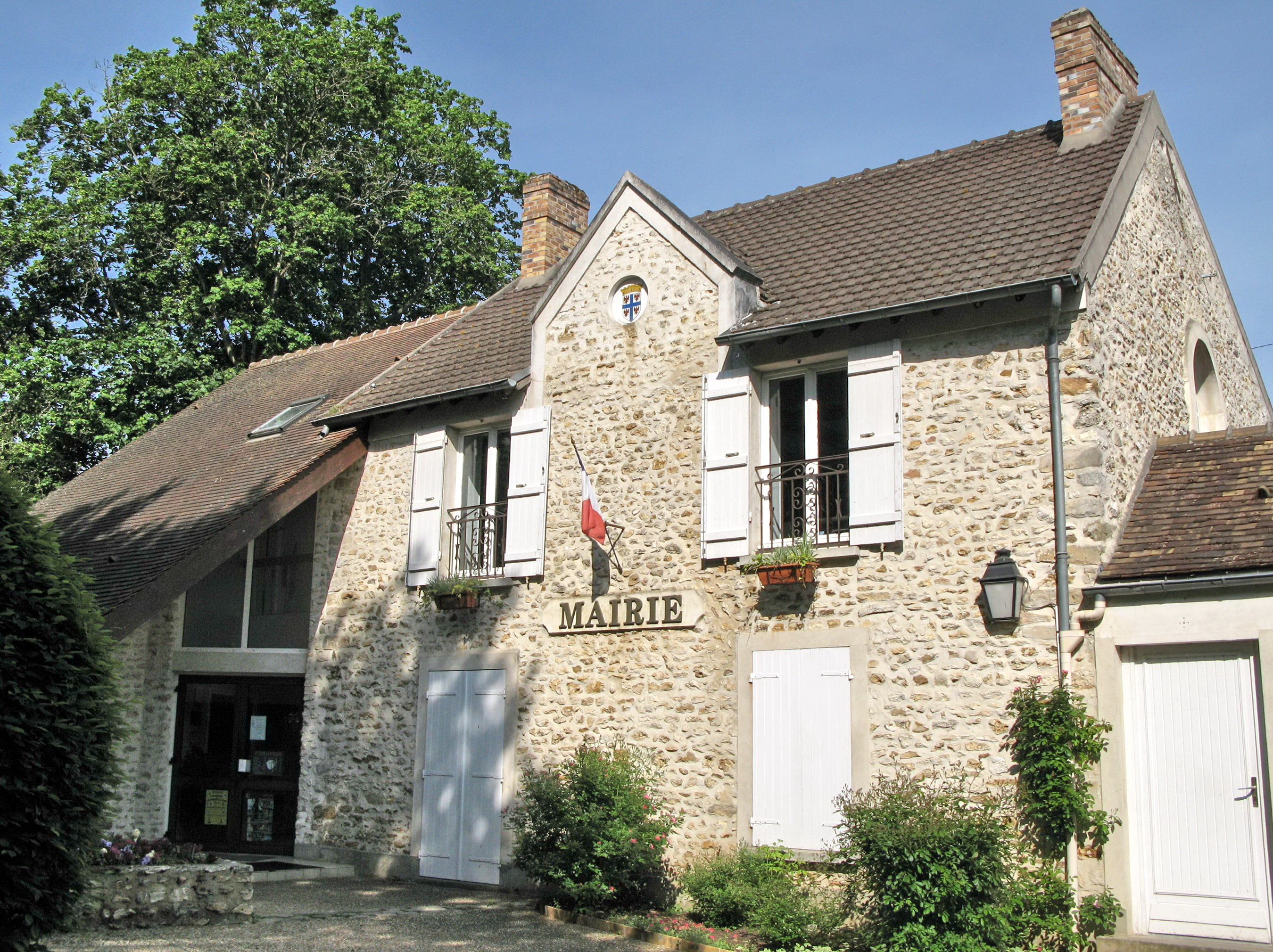 Mairie de Villeconin (Essonne, Île-de-France, France).